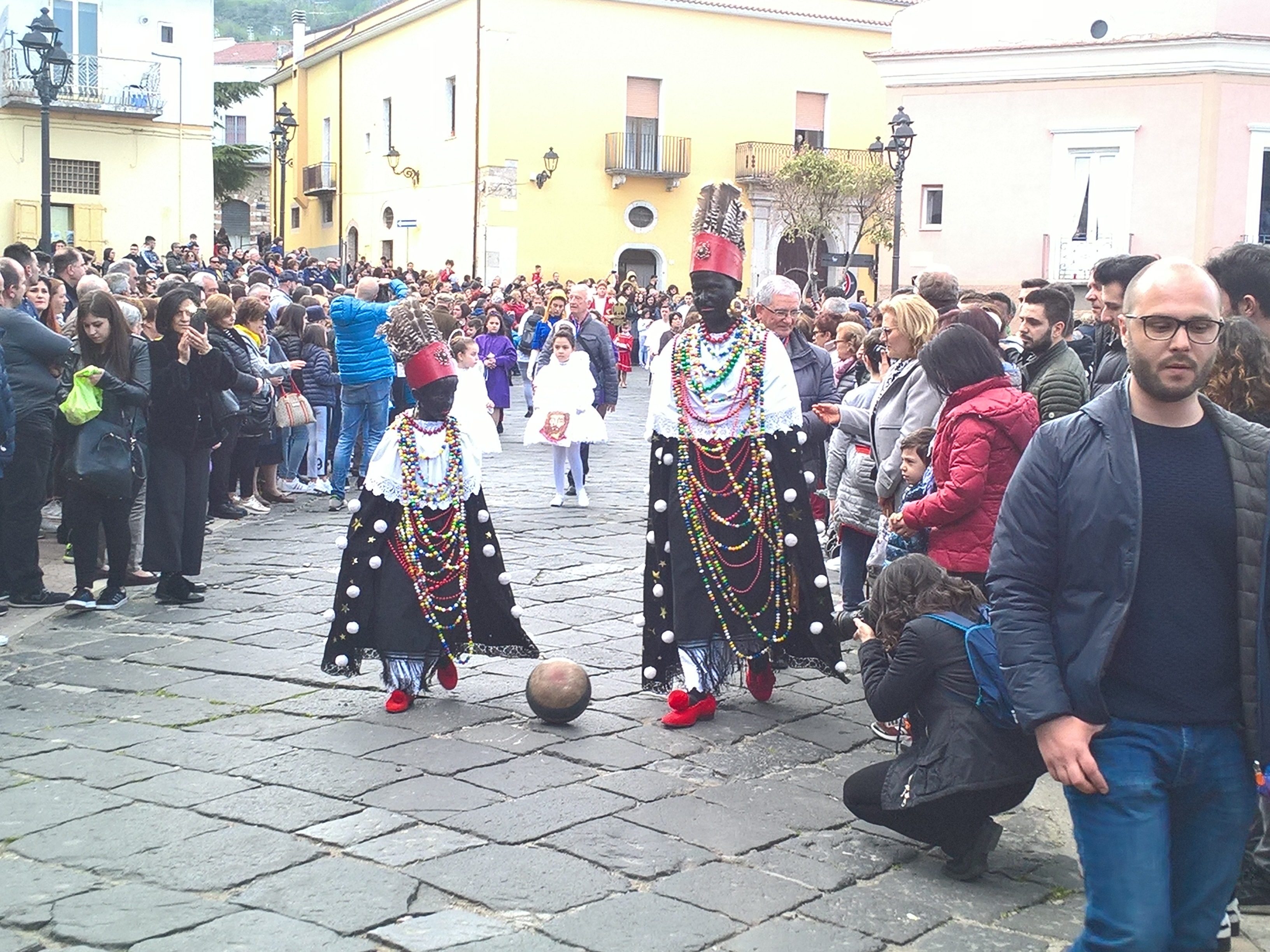 Moro - Lo vuole nella rappresentazione la tradizione. Non ha una identità precisa forse vuole essere un personaggio di contrasto e quindi pagano.